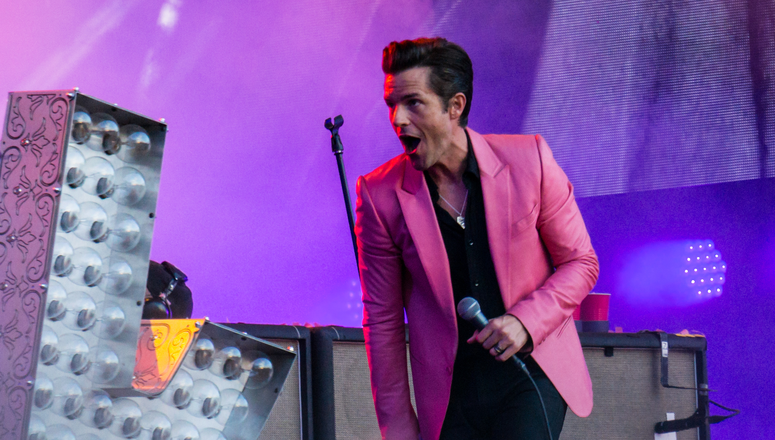 KillersBST080717-33